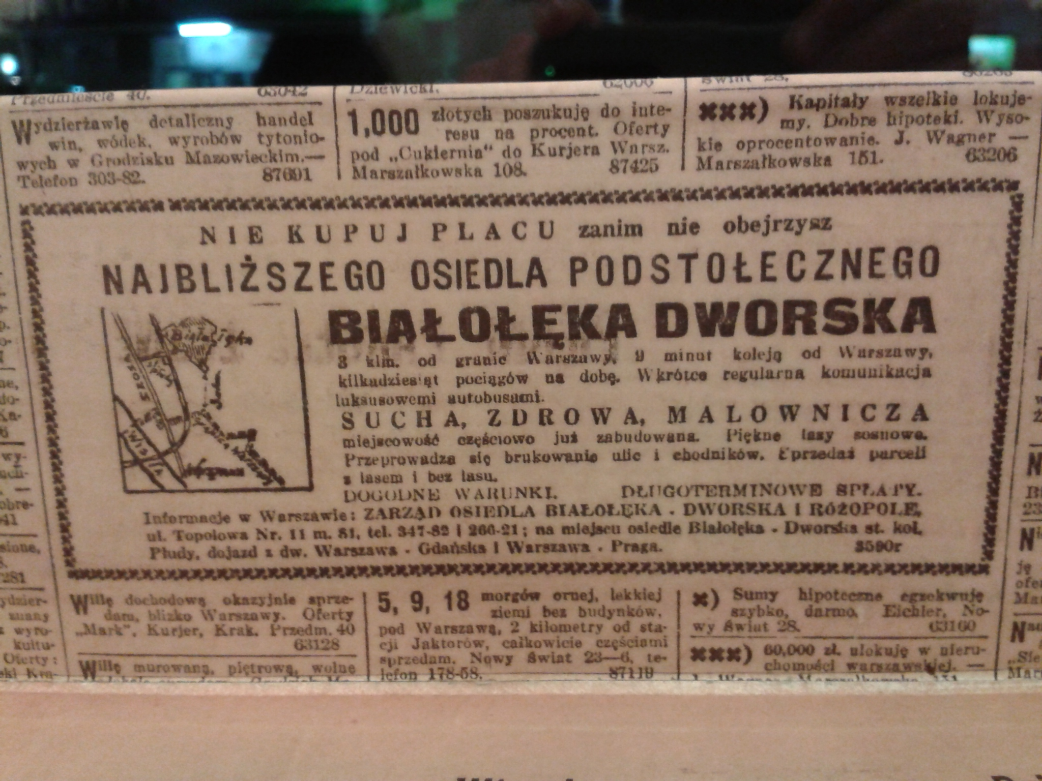 Ogłoszenie sprzedaży działek w Białołęce Dworskiej, Kurier Warszawski 1930